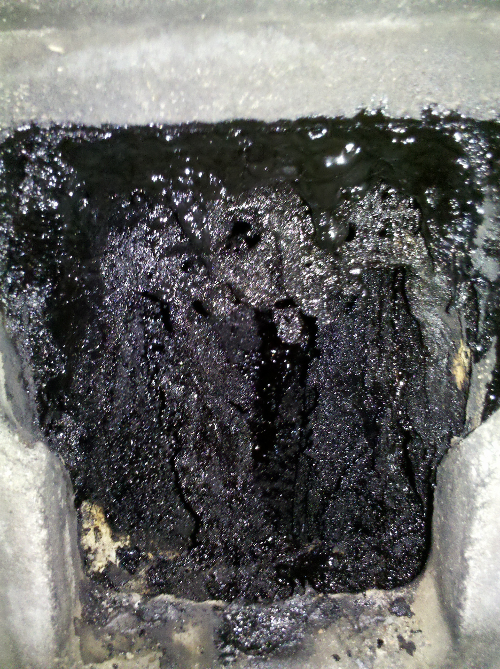 Blick in die geöffnete obere Reinigungsklappe eines Schornsteines nach einem Rußbrand. Der Querschnitt ist vollkommen zugesetzt und ein Abzug der Abgase nicht mehr möglich!